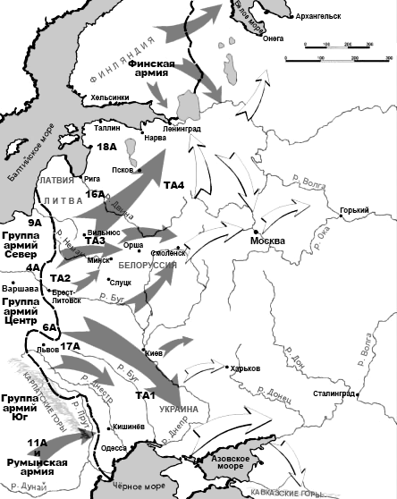 Русская карта операции «Барбаросса»